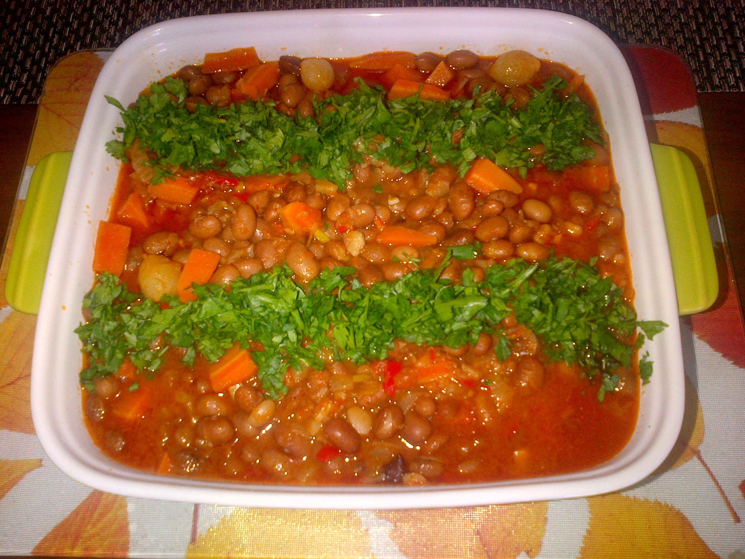 Barbunya pilaki, es "pilaki" de judias pintas. Es un plato de la categoria de pilakis en la cuina turca, que es una subcategoria de los "zeytinyağlılar" (platos hechos con aceite de oliva y que se comen frios). También existe pilaki de judias blancas y otras legumbres y verduras, y de pescados como "uskumru" (caballa).